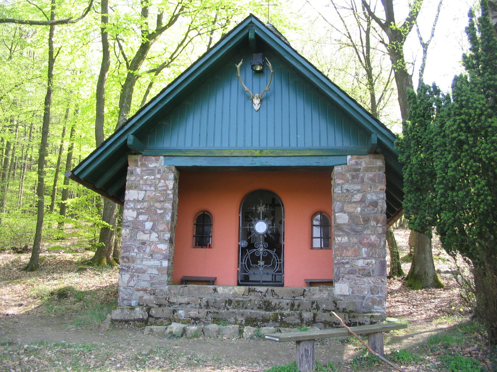 St.-Josef-Kapelle bei Hof Mappen am Rheingauer Gebück, erbaut 1938 von Richard Graf Matuschka-Greiffenclau und seiner Frau Eleonore